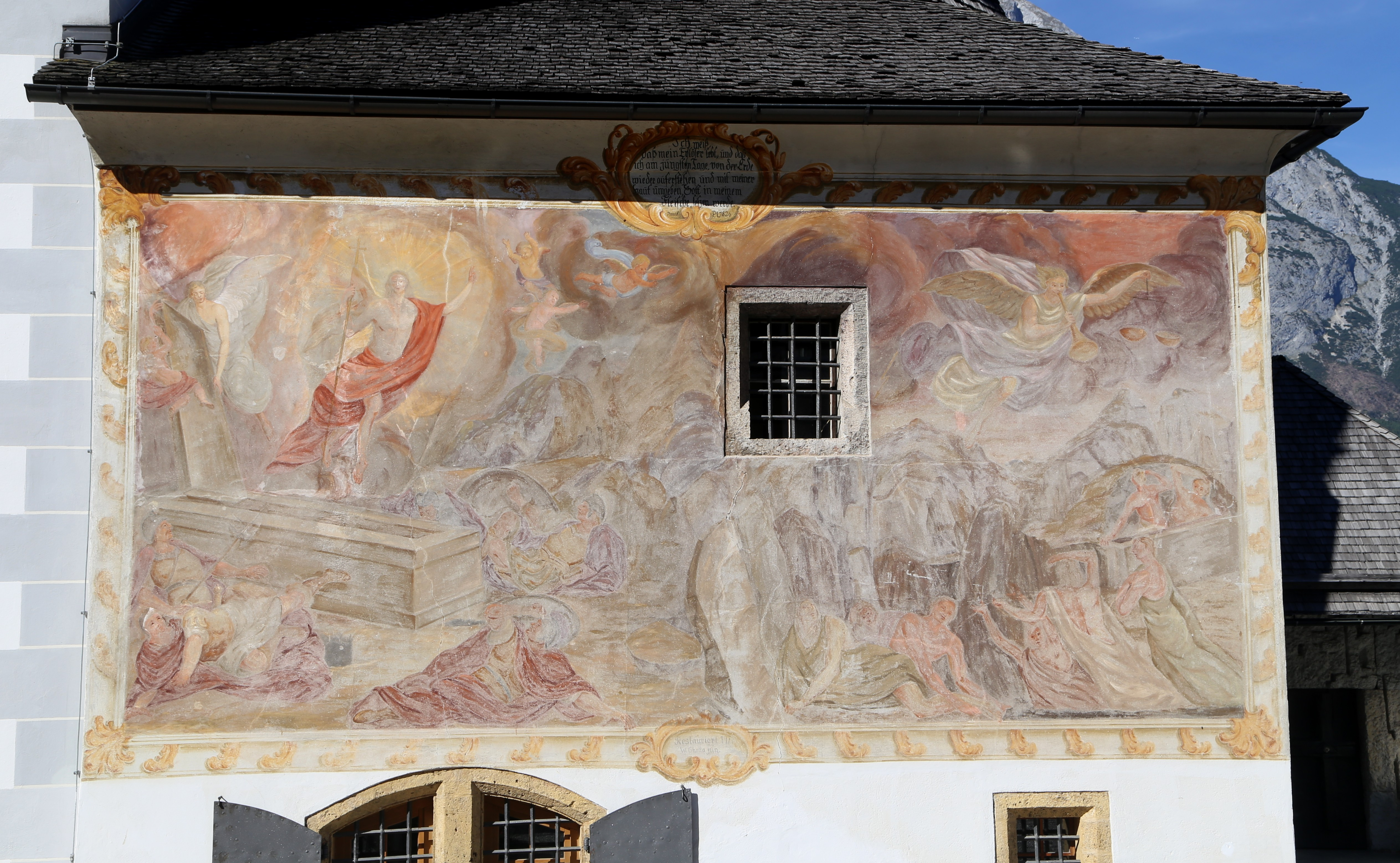 Kath. Pfarrkirche Mariä Himmelfahrt, Dorfplatz, Pfaffenhofen (Tirol); Über einer frühchristlichen Kirche wurde im 14./15. Jahrhundert ein spätgotischer Bau errichtet, der im 18. Jahrhundert barockisiert wurde. 1860/1863 wurde die Kirche nach Plänen von August Essenwein und Josef von Stadl erweitert und regotisiert. Der einschiffige Bau mit steilem Satteldach, zweijochigem Chor und dreiseitigem Chorschluss weist am Langhaus und Chor eine gotische Gliederung in Form von Dreikantlisenen und einem umlaufenden Kaffgesims auf. Die Westfassade zeigt einen steilen, im Ansatz abgetreppten Fassadengiebel und ein spitzbogig gekehltes Portal. An der Sakristei befindet sich ein Wandbild Auferstehung Christi und Jüngstes Gericht von Leopold Puellacher von 1826. Das Innere ist mit Pilastern gegliedert und weist im Langhaus eine durch Gurtbögen gegliederte Stichkappentonne, im Chor ein Sternrippengewölbe mit spätgotischer Wand- und Rankenmalerei auf Object location47° 17′ 56.86″ N, 11° 04′ 58.4″ E